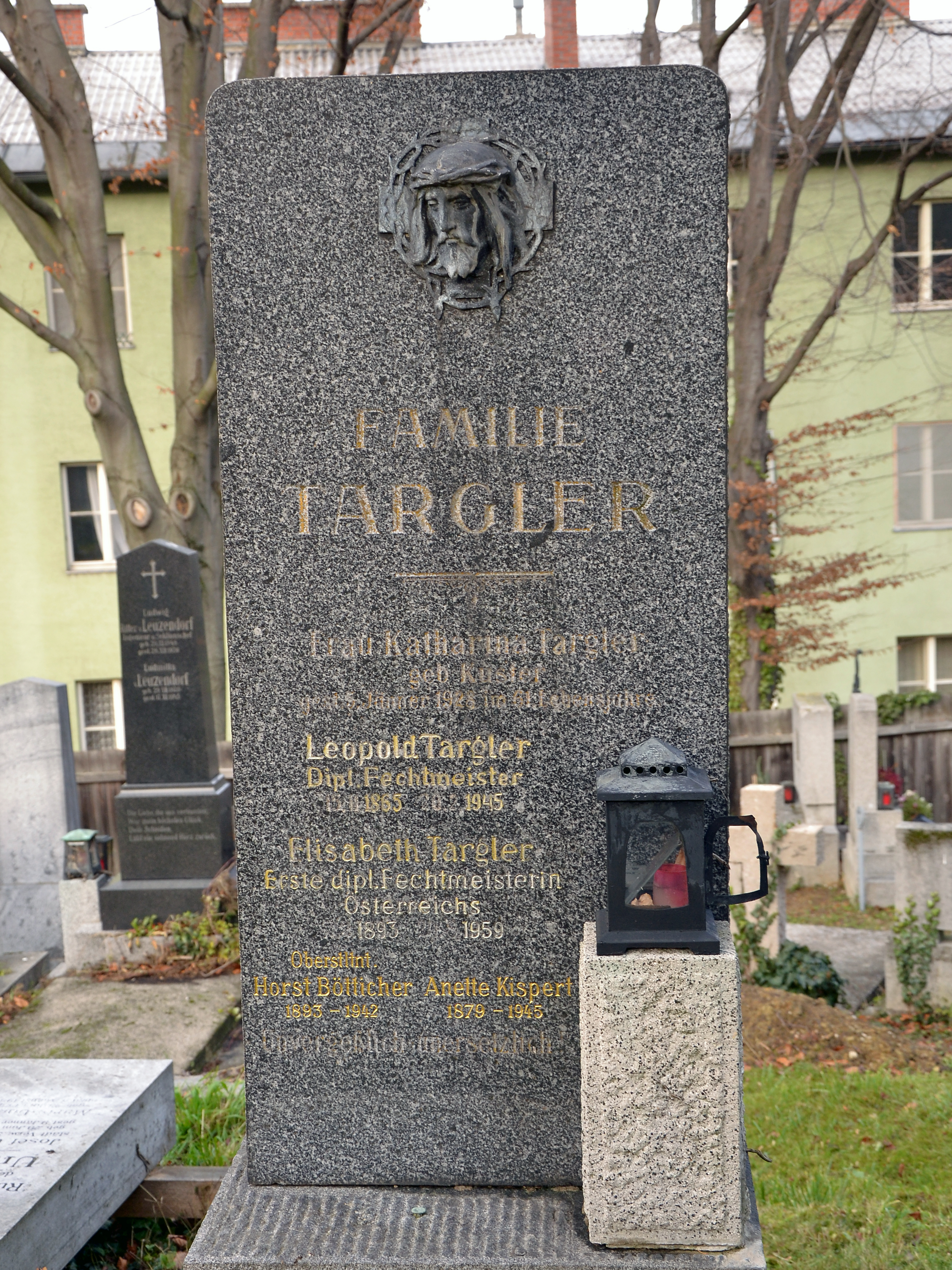 Familie Targler, Fechtmeister